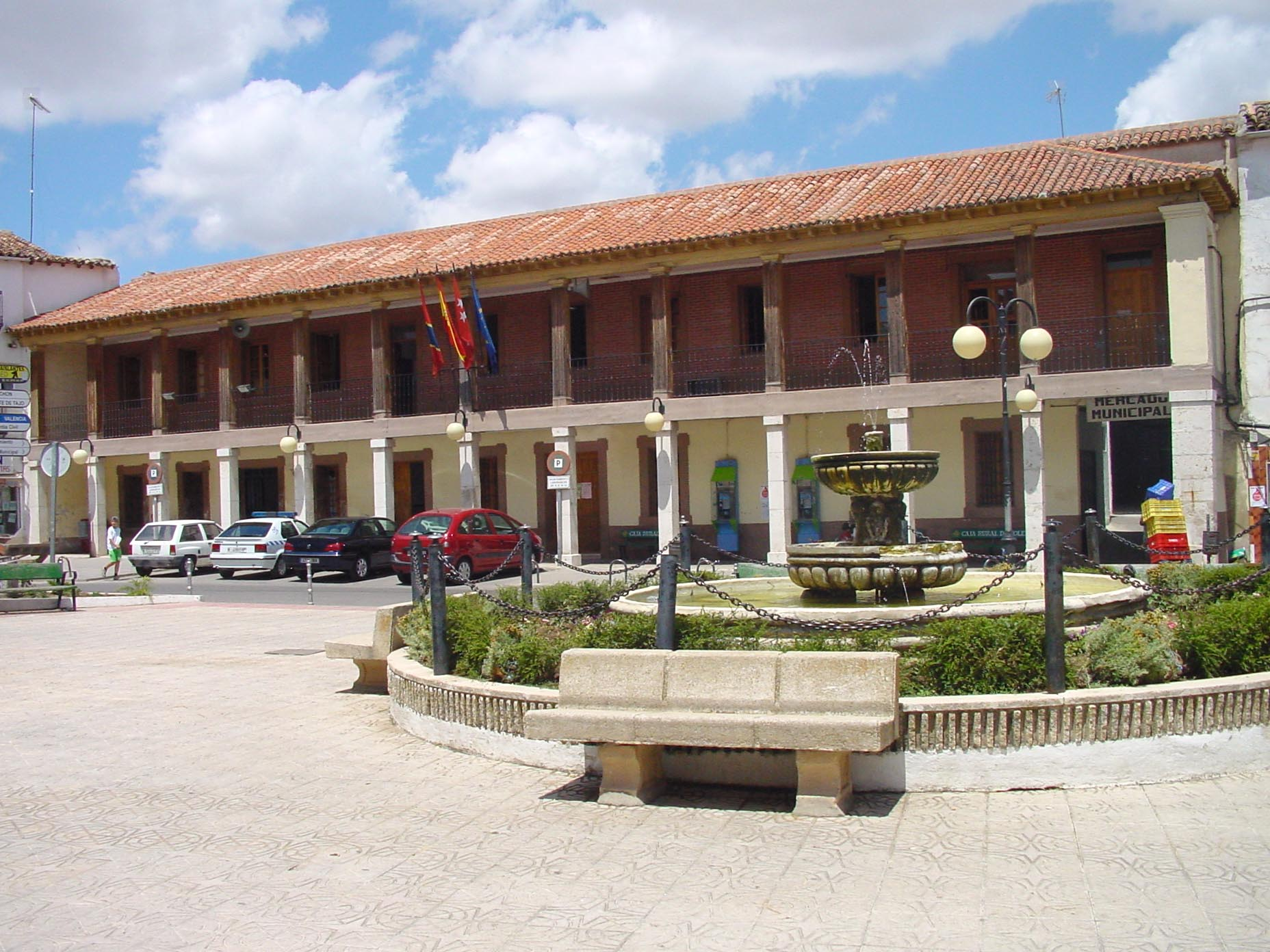 Ayuntamiento de Villarejo de Salvanés.